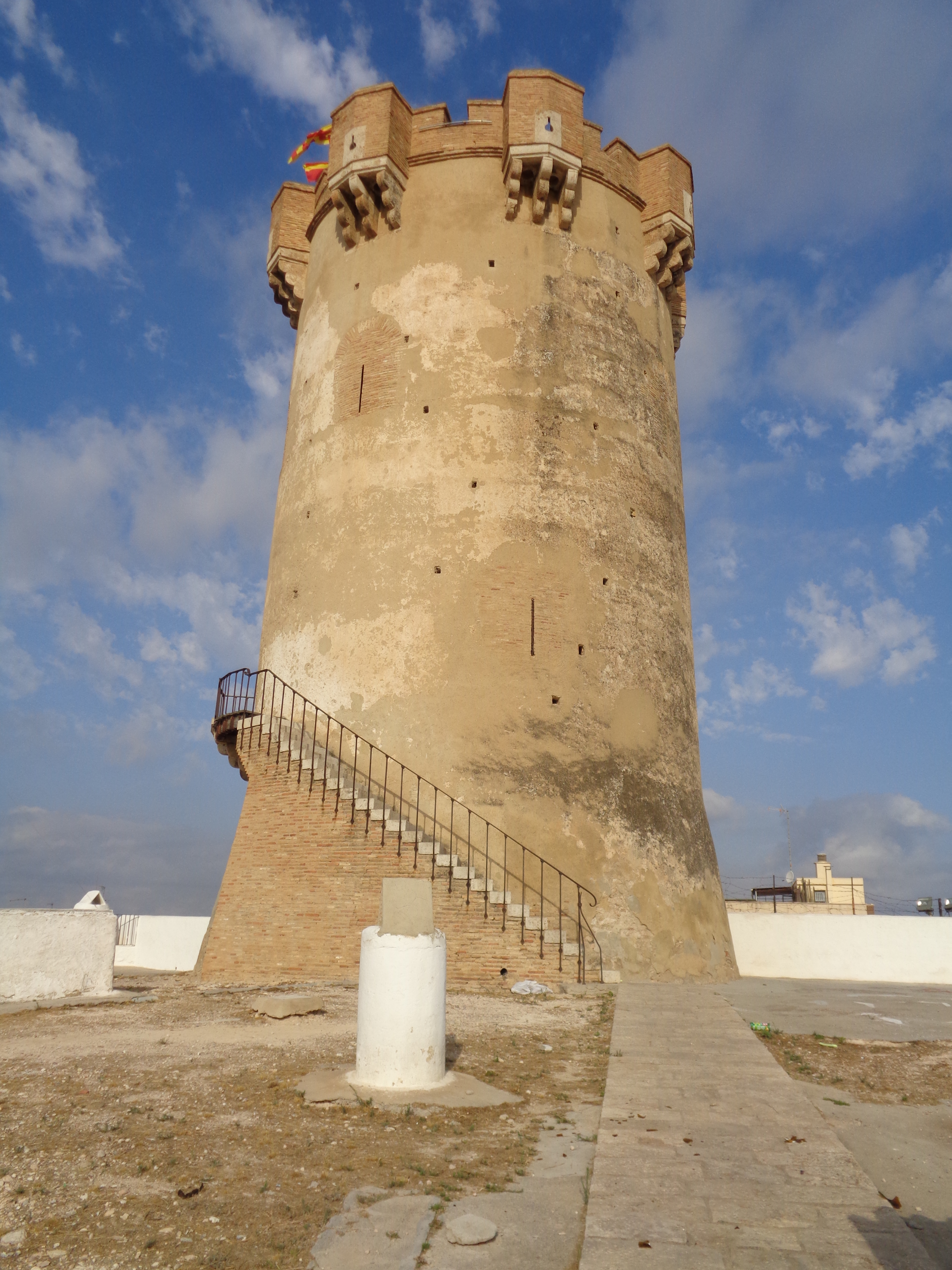 Torre de Paterna.